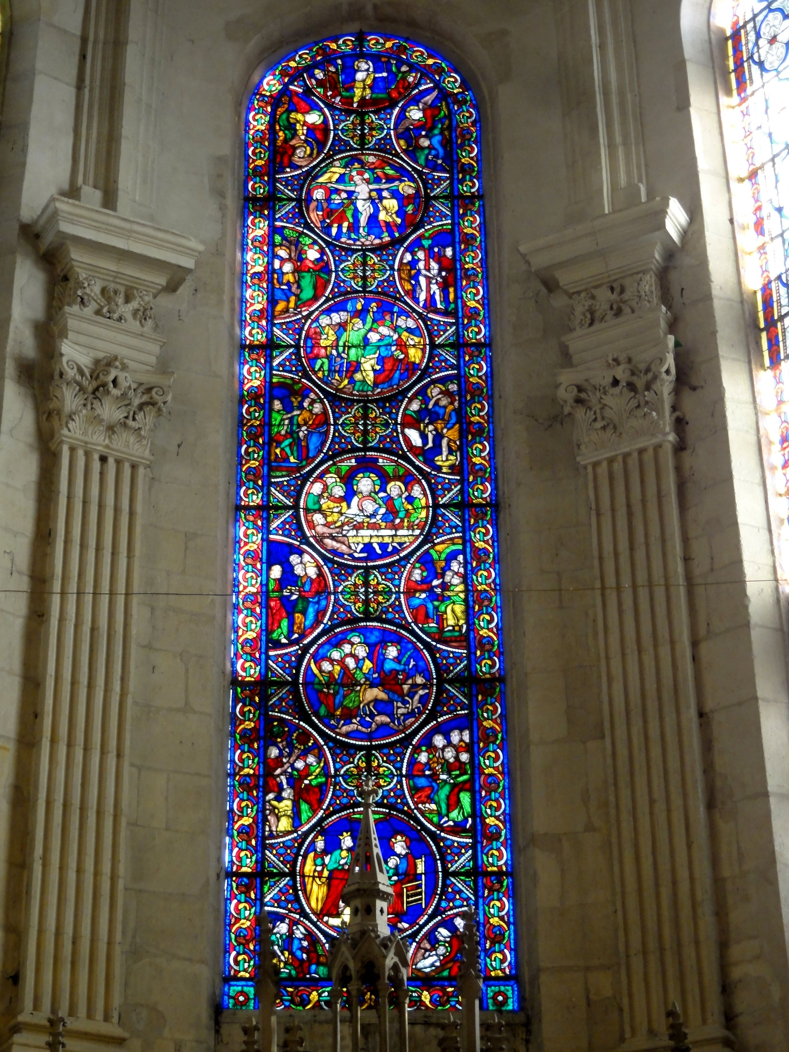 Abside, vitrail n° 0 (baie d'axe), dans le style du XIIIe siècle.